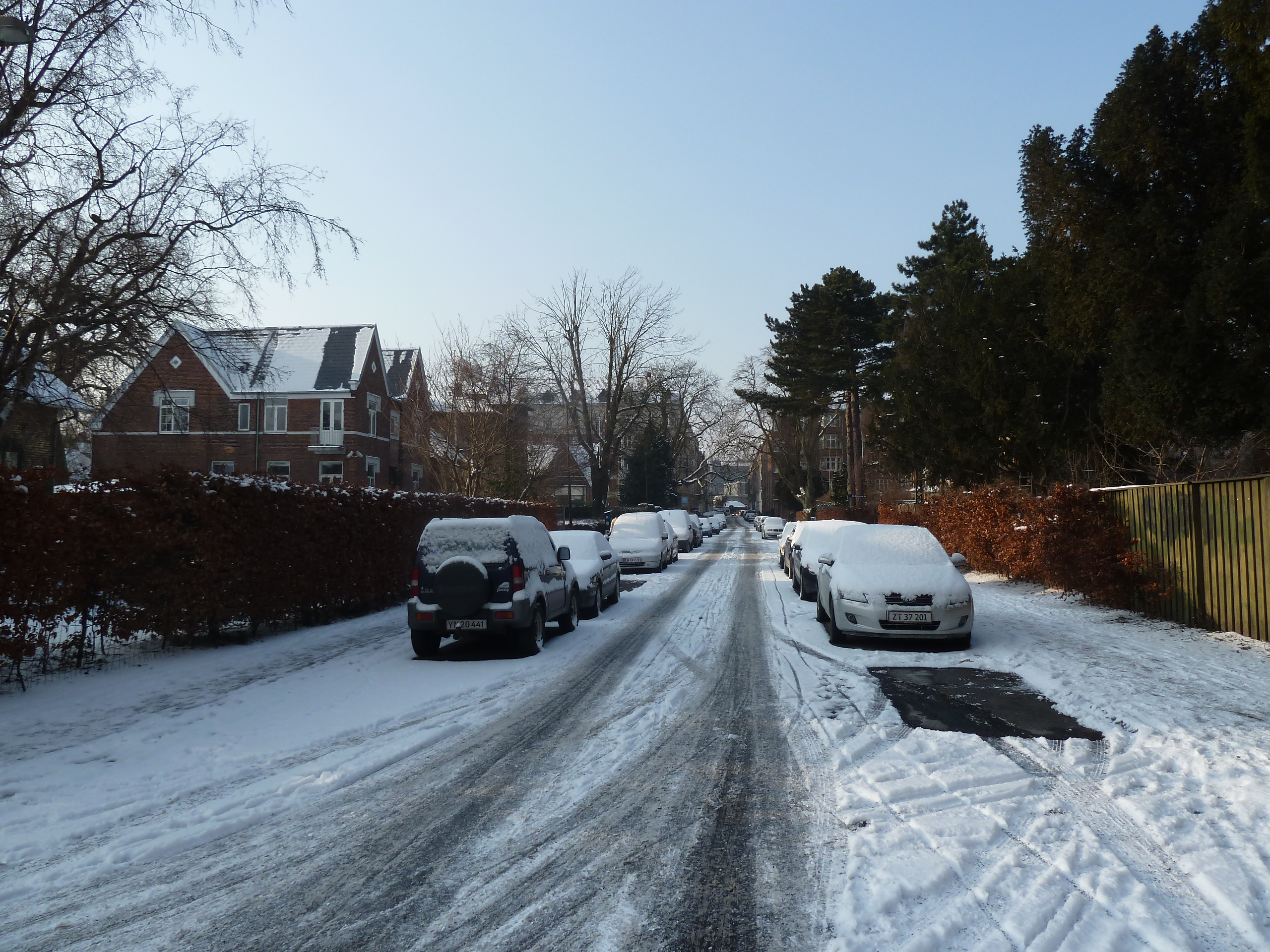 The street Rosenvængets Hovedvej in Østerbro in Copenhagen.